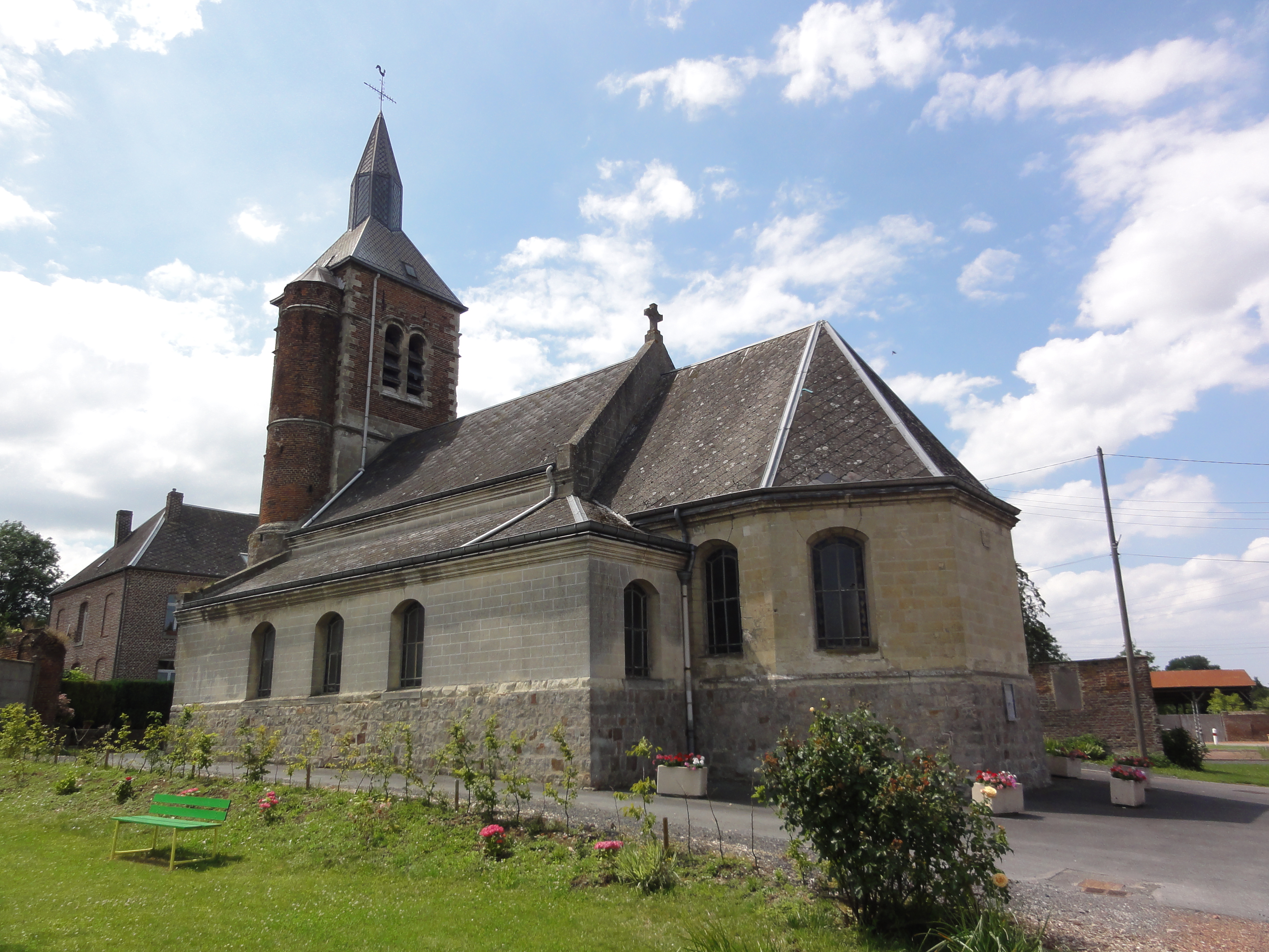 Montrécourt (Nord, Fr) l'église